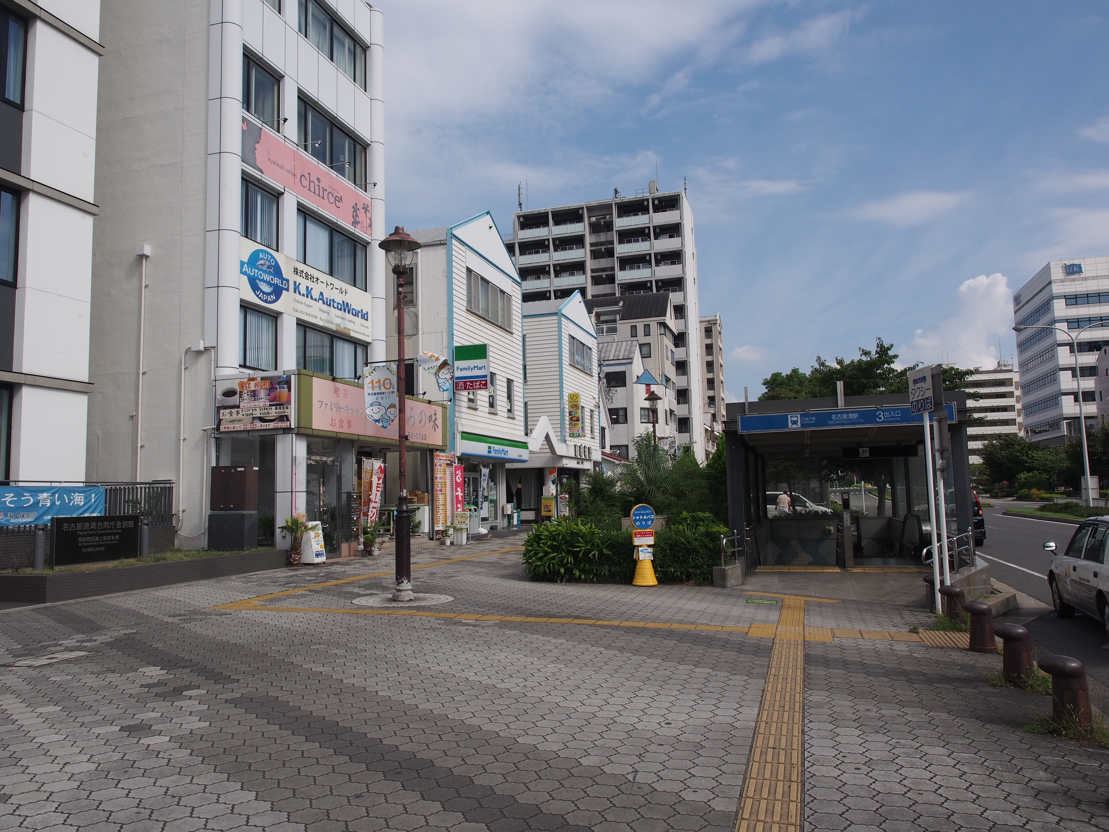 名古屋港駅